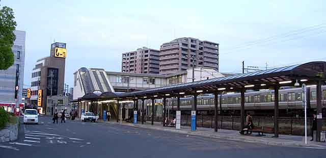 野洲駅付近